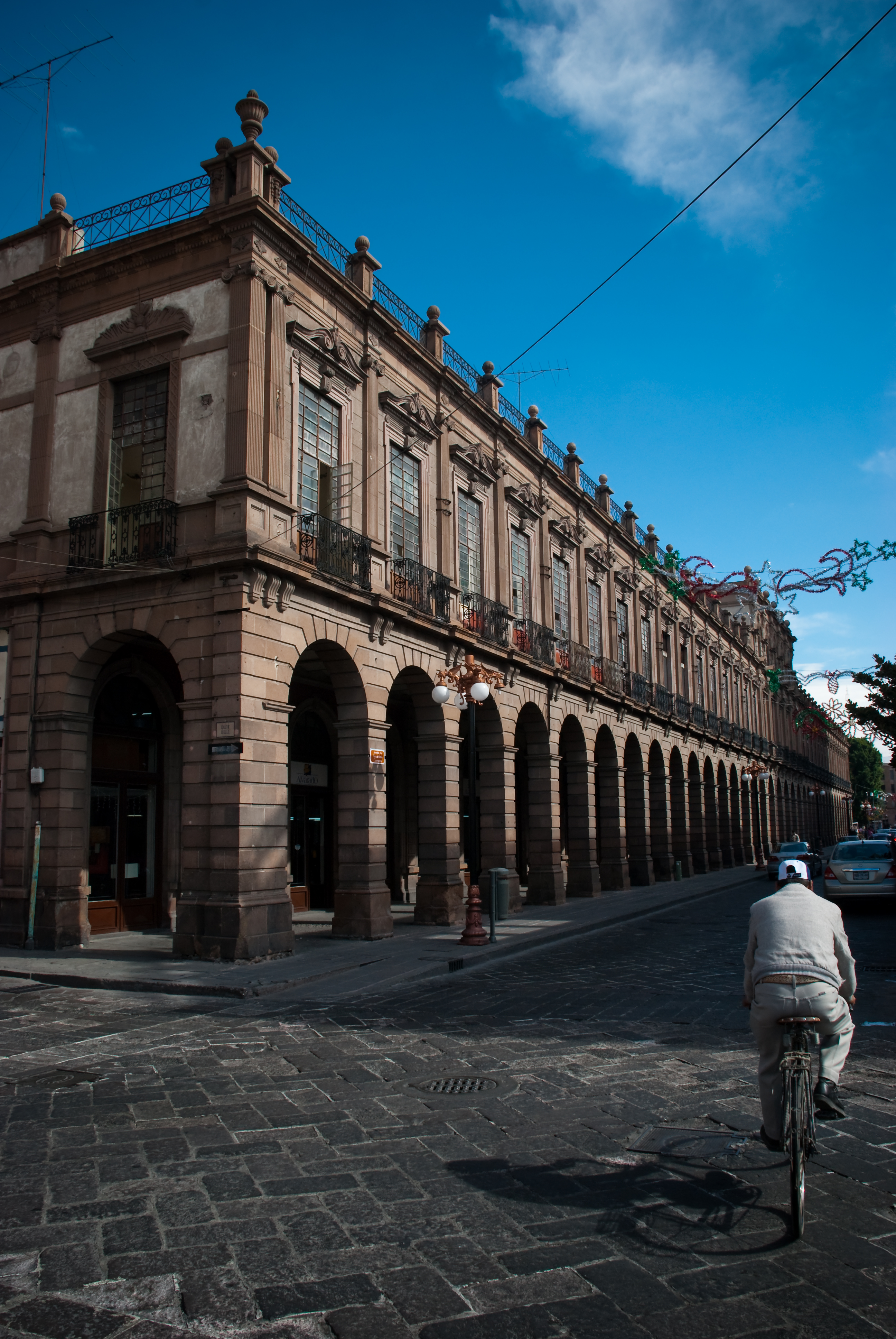 Según la audioguía que nos prestaron, el edificio Ipiña poseé una arquería que, por su fama, se considera típica de esta Ciudad.